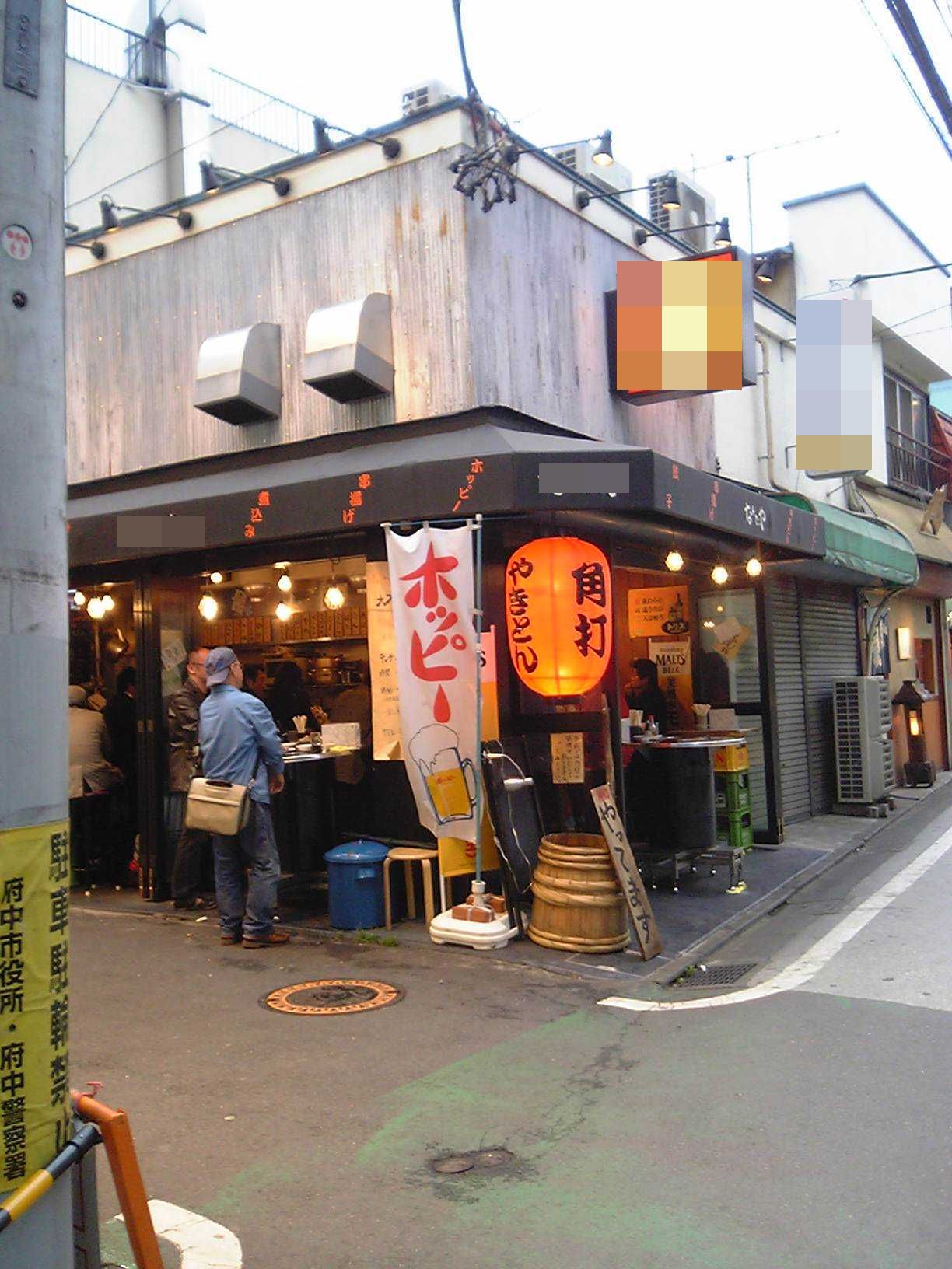 「なんでや 分倍河原店」。分倍河原駅の近くにあった立ち飲み店。東京都府中市片町2丁目。2012年7月に閉店し、同一の経営母体によるピザ店へ業態変更した。（2006年5月14日、Hykw-a4が撮影）